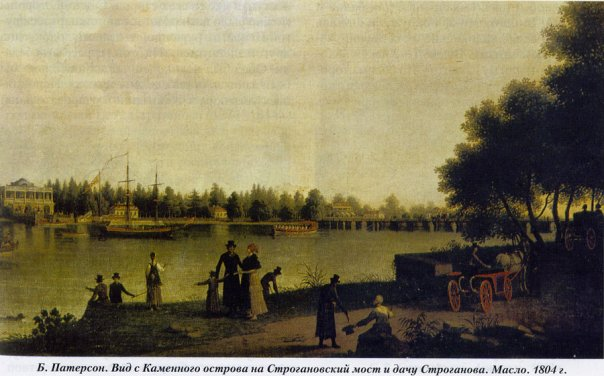 Вид с Каменного острова на Строгановский мост и дачу Строганова. Масло. 1804.